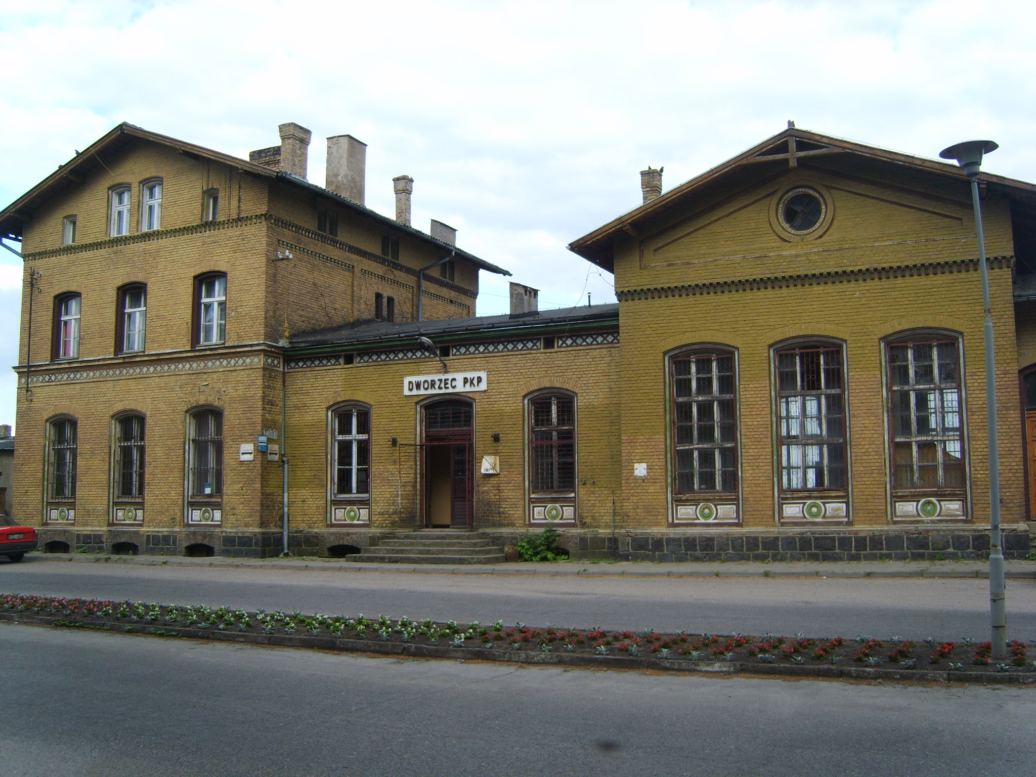 Dworzec kolejowy w Lipce.